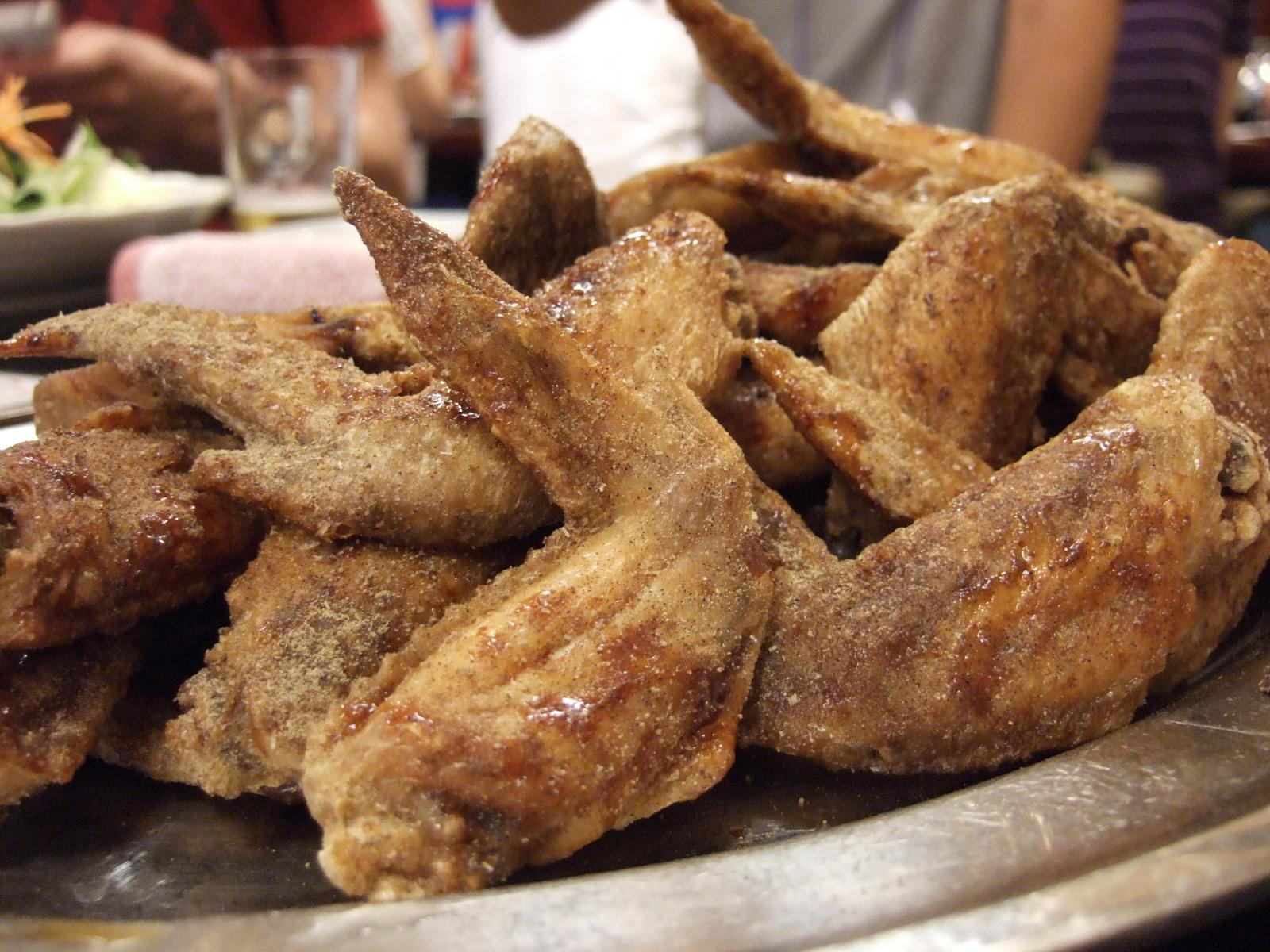 手羽先の唐揚げ（愛知県名古屋市中区金山4-4-15、（株）エスワイフードの「世界の山ちゃん」[1]金山中央店）